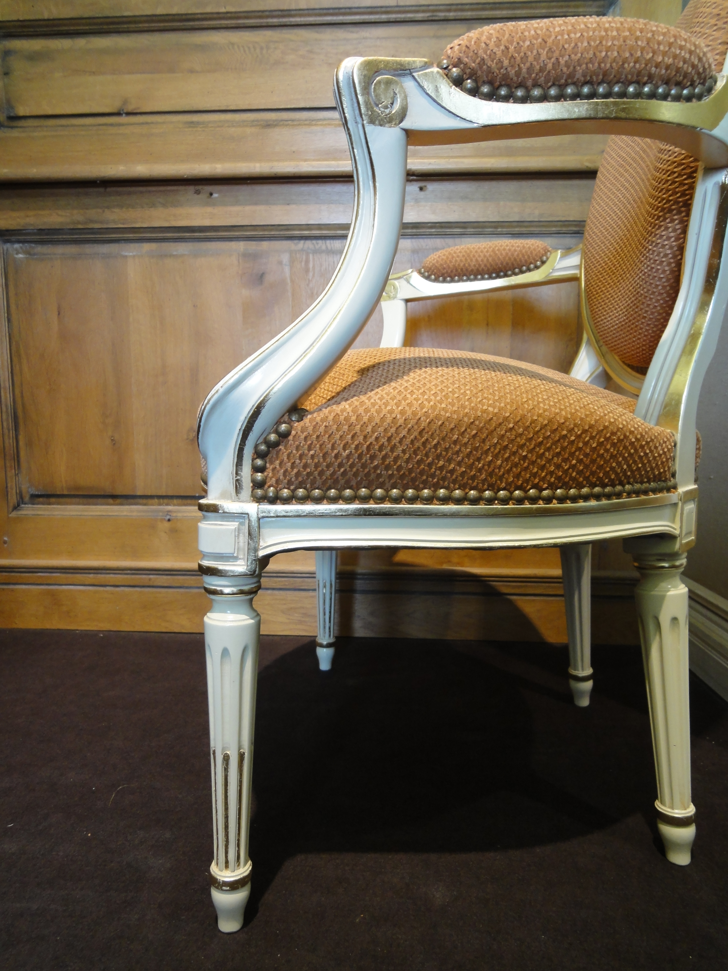 Style Transition, réalisé par les Ateliers Allot Frères.